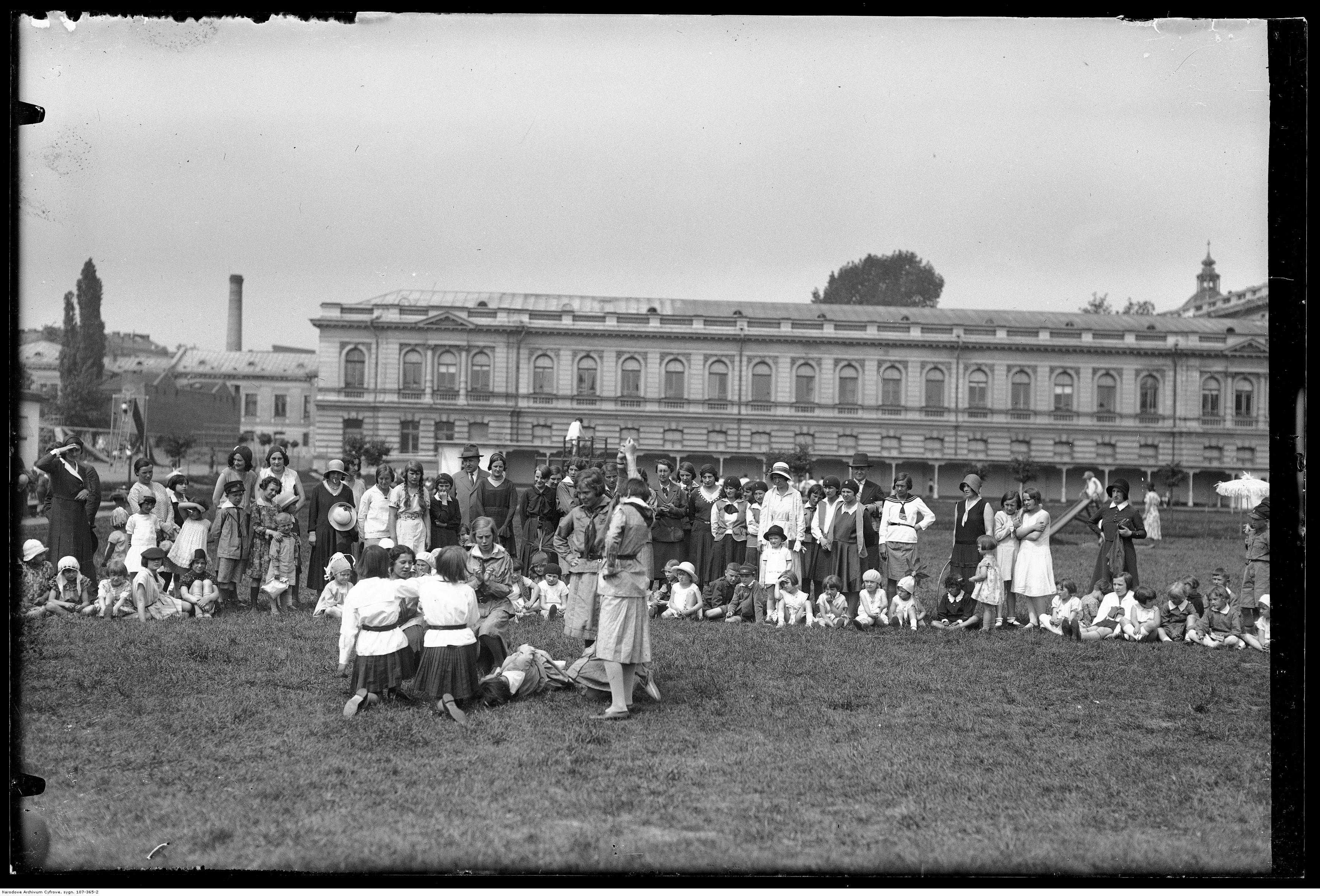 Zabawa w teatr.